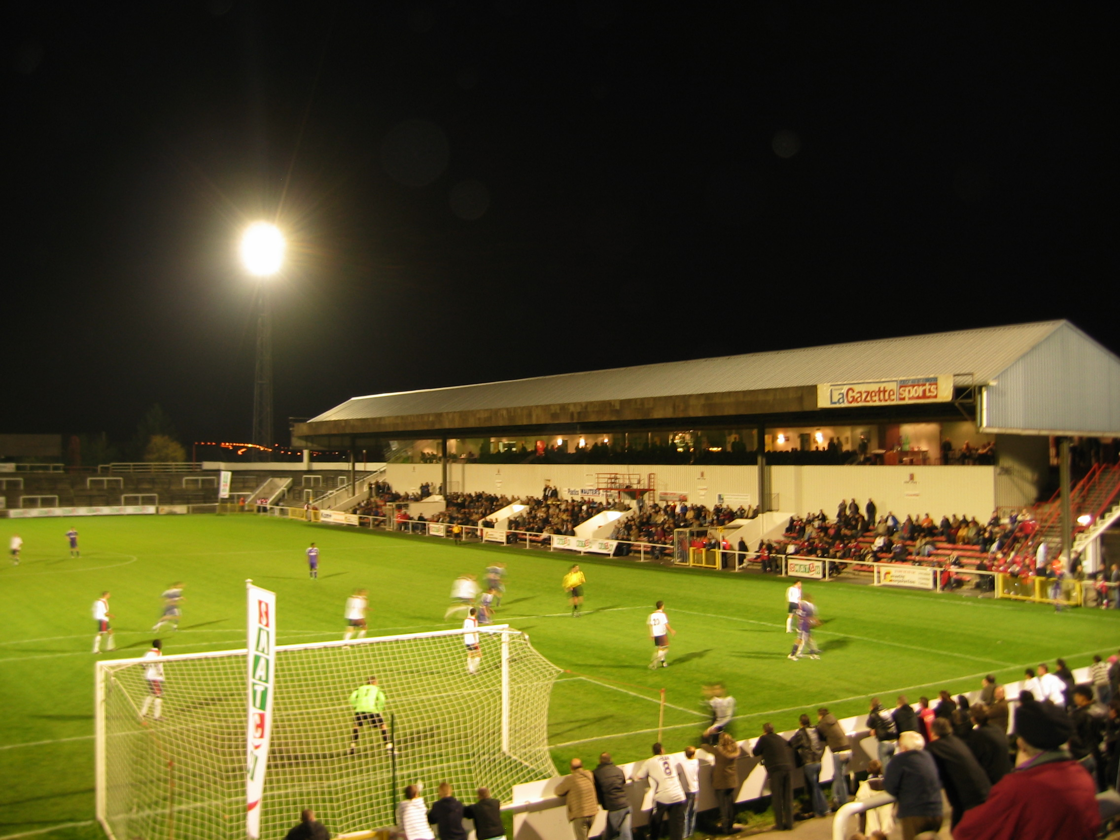 ROC de Charleroi-Marchienne in Stade de Neuville tijdens de vriendschappelijke wedstrijd tegen RSC Anderlecht.